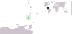 Description:Carte de localisation de l'île Ronde, Grenade Auteur:Rémih